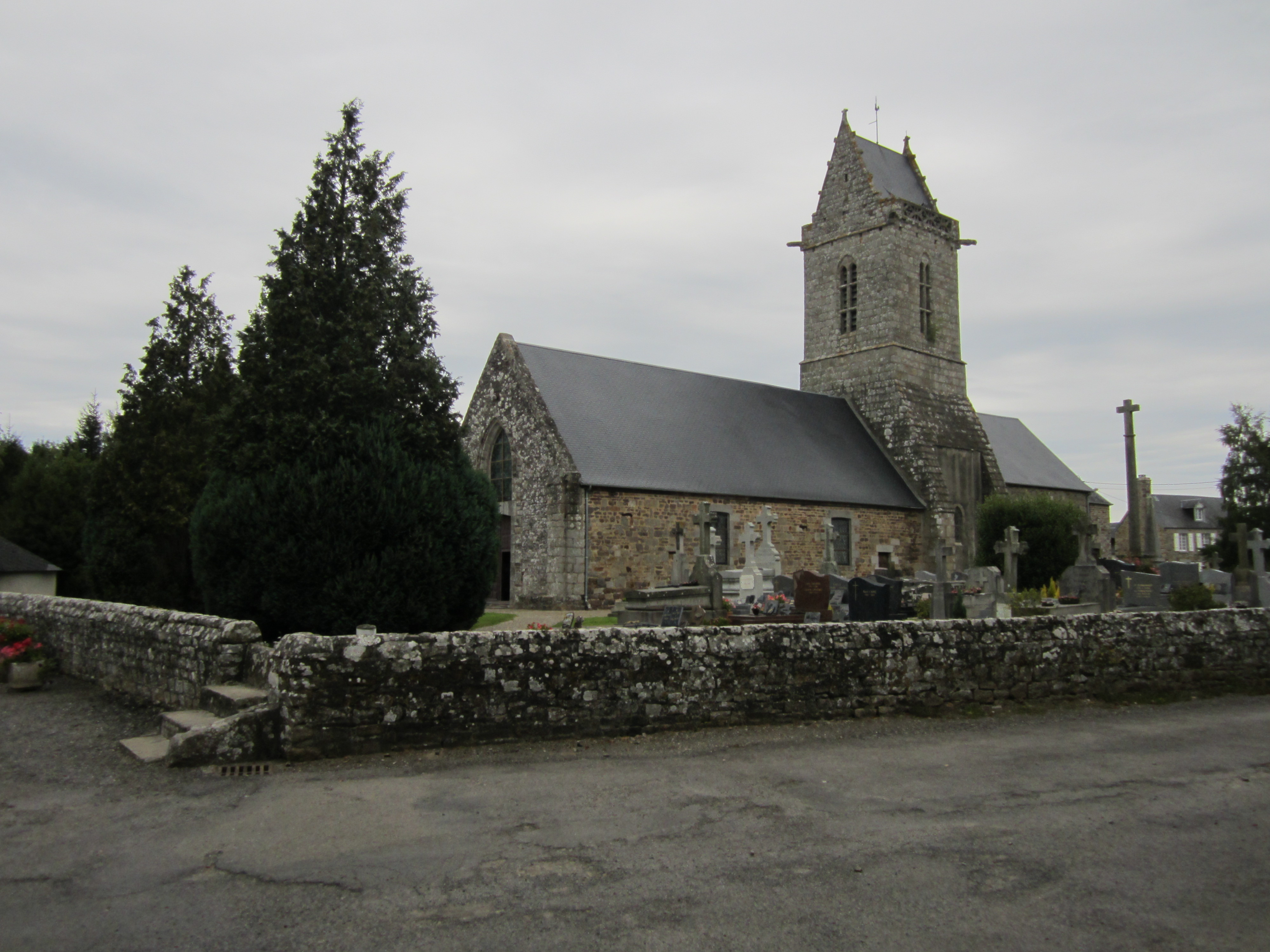 Église romane (XIIe siècle) au clocher gothique de Saint-Aubin-des-Préaux, Manche .